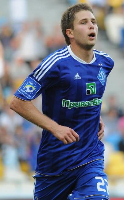 Артем Кравець - український футболіст під час виступів за Динамо (Київ)